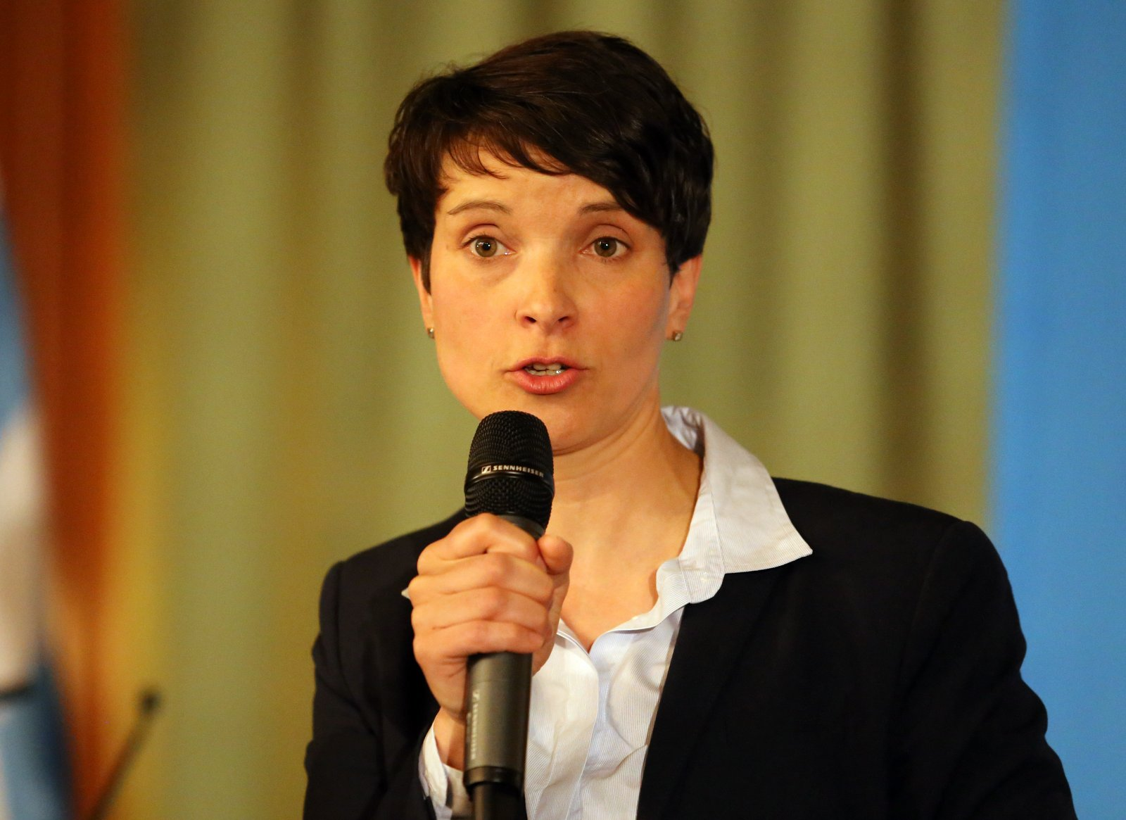 Frauke Petry, deutsche Politikerin der 'Alternative für Deutschland' (AfD), promovierte Chemikerin und Unternehmerin, Mitglied des Sächsischen Landtags. Hier am 13. Mai 2016 auf einer AfD-Veranstaltung im Münchner Hofbräukeller. Titel des Werkes: "Frauke Petry, AfD, am 13. Mai 2016 im Münchner Hofbräukeller"